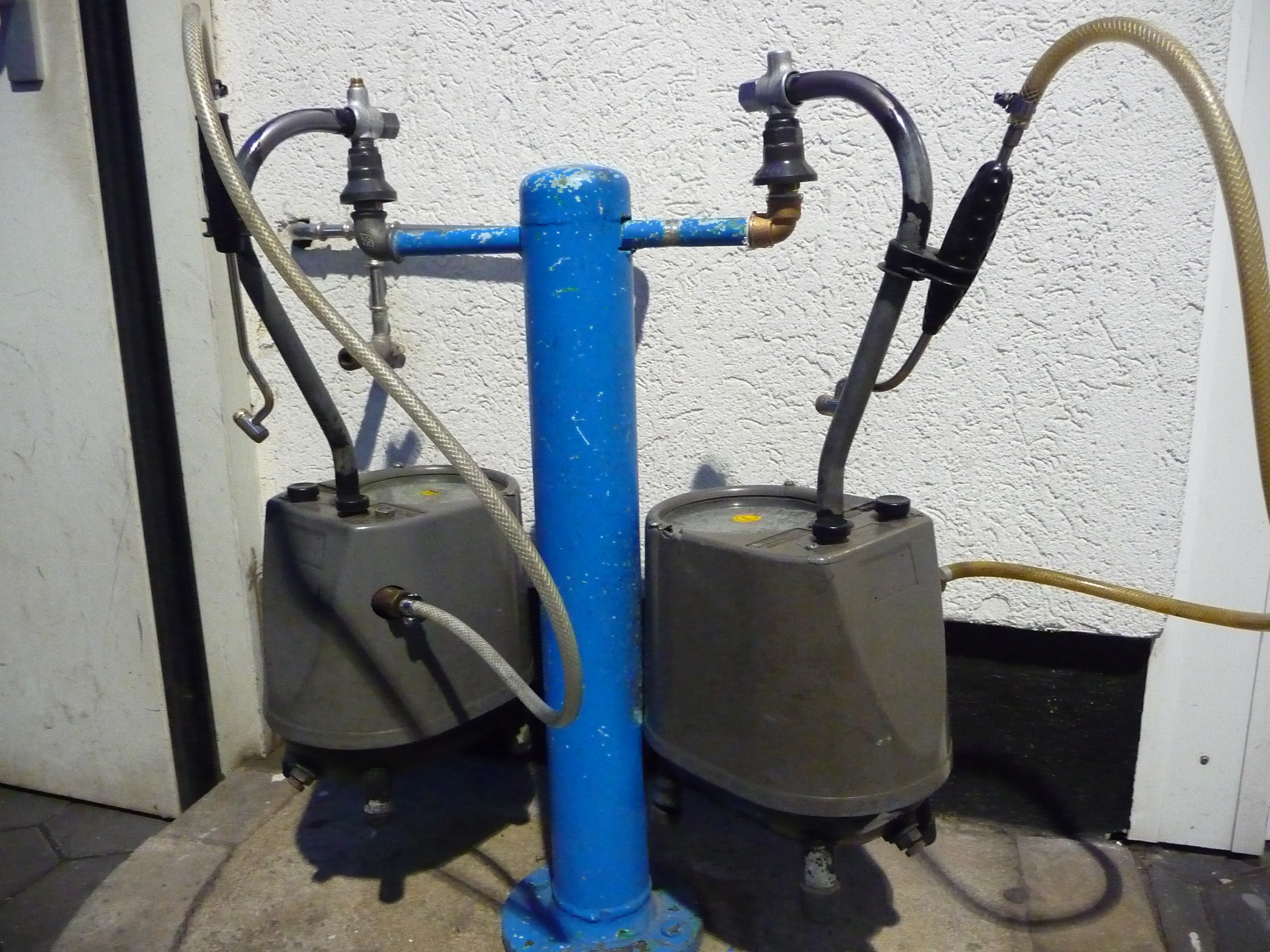 Mechanische Geräte zur Überprüfung des Reifendrucks